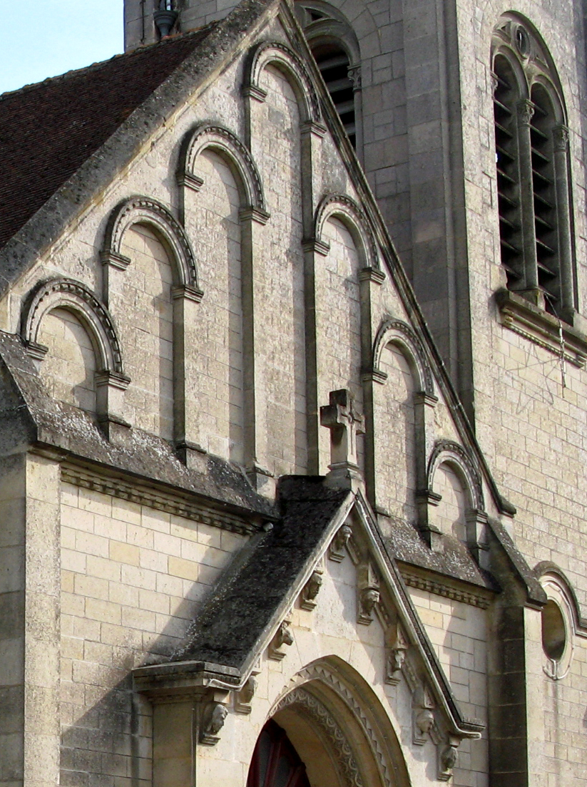 Nouvron-Vingré (Aisne, France) - L'église dont le fronton de façade est décoré de 7 arcades. . .